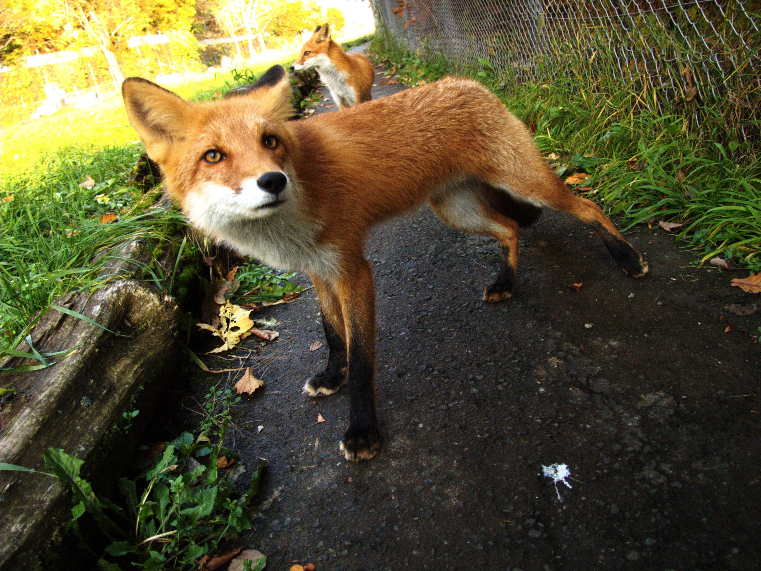 北きつね牧場。留辺蘂（るべしべ）、温根湯（おんね湯）温泉。北海道北見市。